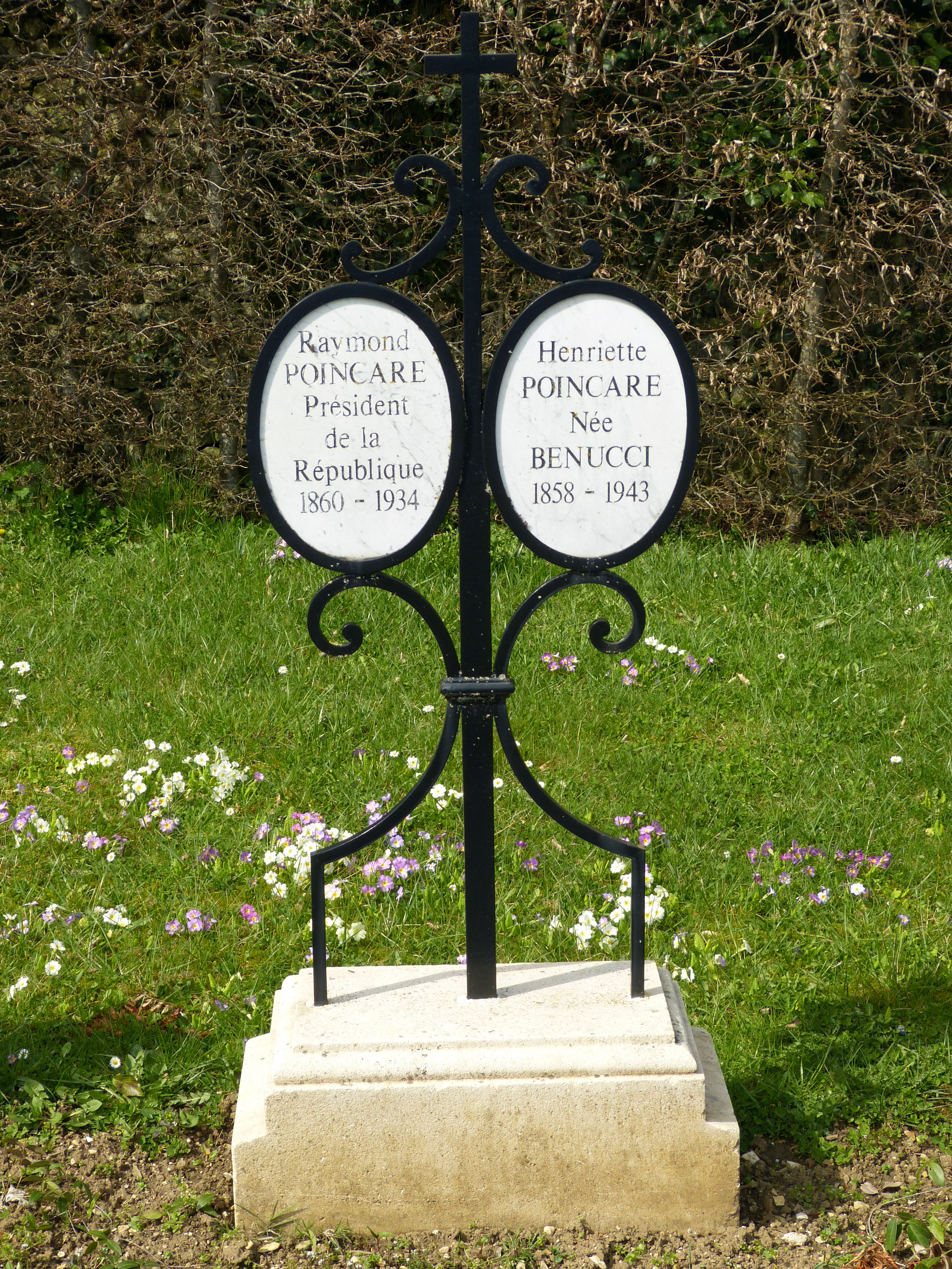 Cimetière de Nubécourt (Meuse) : tombe de Raymond Poincaré, président de la République (1860-1934) et de son épouse Henrette, née Benucci (1858-1943)